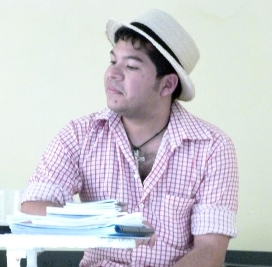 El joven poeta panameño Javier Alvarado durante su visita a Cuba en enero de 2013.